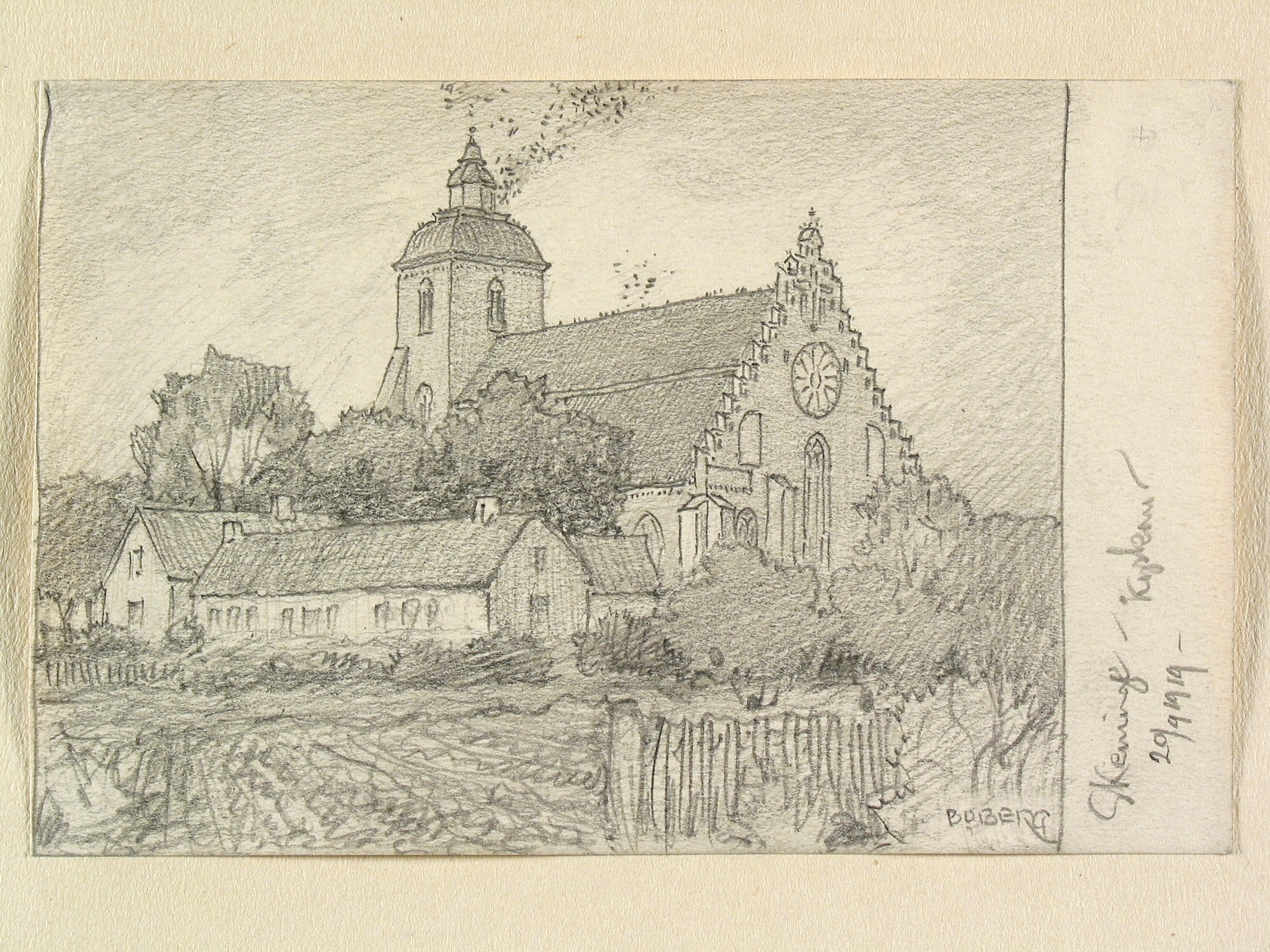 Östergötland, Skänninge, Vårfrukyrkan. Teckning av Ferdinand Boberg Depicted place: Skänninge kyrka (Gård), Q10670953 (Q10670953)